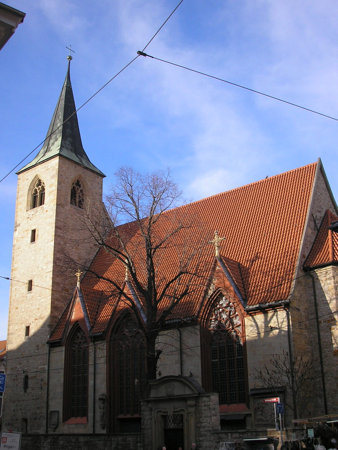 Lorenzkirche (erste Erwähnung 1140) an der Ecke Pilse/Schlösserstraße in Erfurt